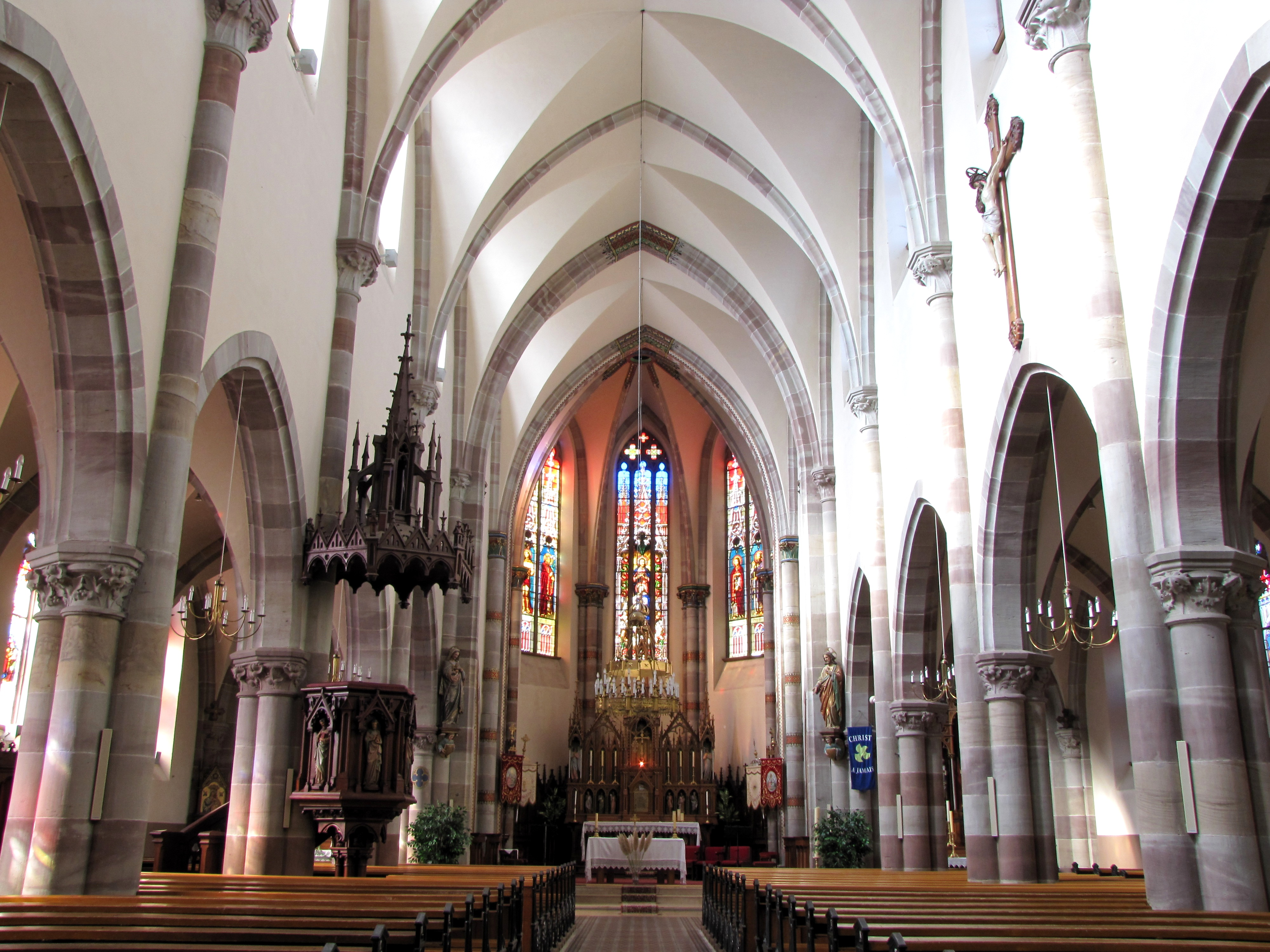 Alsace, Bas-Rhin, Église Notre-Dame de l’Assomption de Bernardswiller (PA00084612, IA00023770). Vue intérieure de la nef vers le chœur.